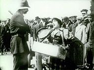 Escena de la película Mabel's Busy Day (1914) de Charlie Chaplin.